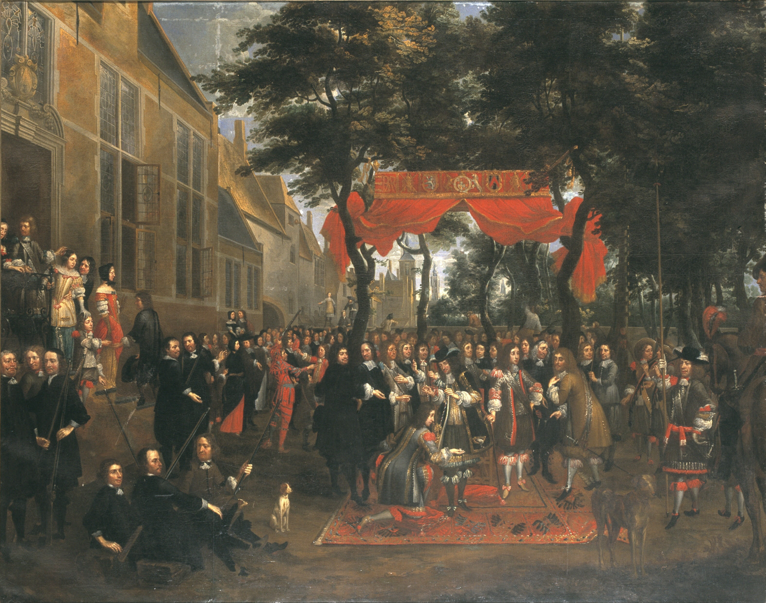 Voorstelling van de overhandiging van een halssnoer met een gouden vogel, door de Engelse koning Charles II aan zijn broer Jacob Stuart, hertog van York. Deze gebeurtenis vond plaats op 2 oktober 1656, de dag waarop het koninklijk gezelschap werd ontvangen door het bestuur van de Sint-Barbaragilde en Jacob Stuart de hoofdvogel, de 'papegay', heeft afgeschoten. De eigenlijke overhandiging is uitgebeeld in de tuin van de schuttersgilde, onder een baldakijn dat versierd is met de blazoenen van het Engelse koningshuis, de Stad Brugge en de hoofdman Vincent Stochove, die op dat moment het gildebestuur voorzat. Net als op het pendant is de groep begeleid door tal van gildeleden en dignitarissen, waaronder opnieuw de Brugse bisschop Carolus van den Bosch. (Naar: H. Vlieghe, Stedelijke Musea Brugge. Catalogus Schilderijen 17de en 18de eeuw, Brugge, 1994, pp. 186-187.)